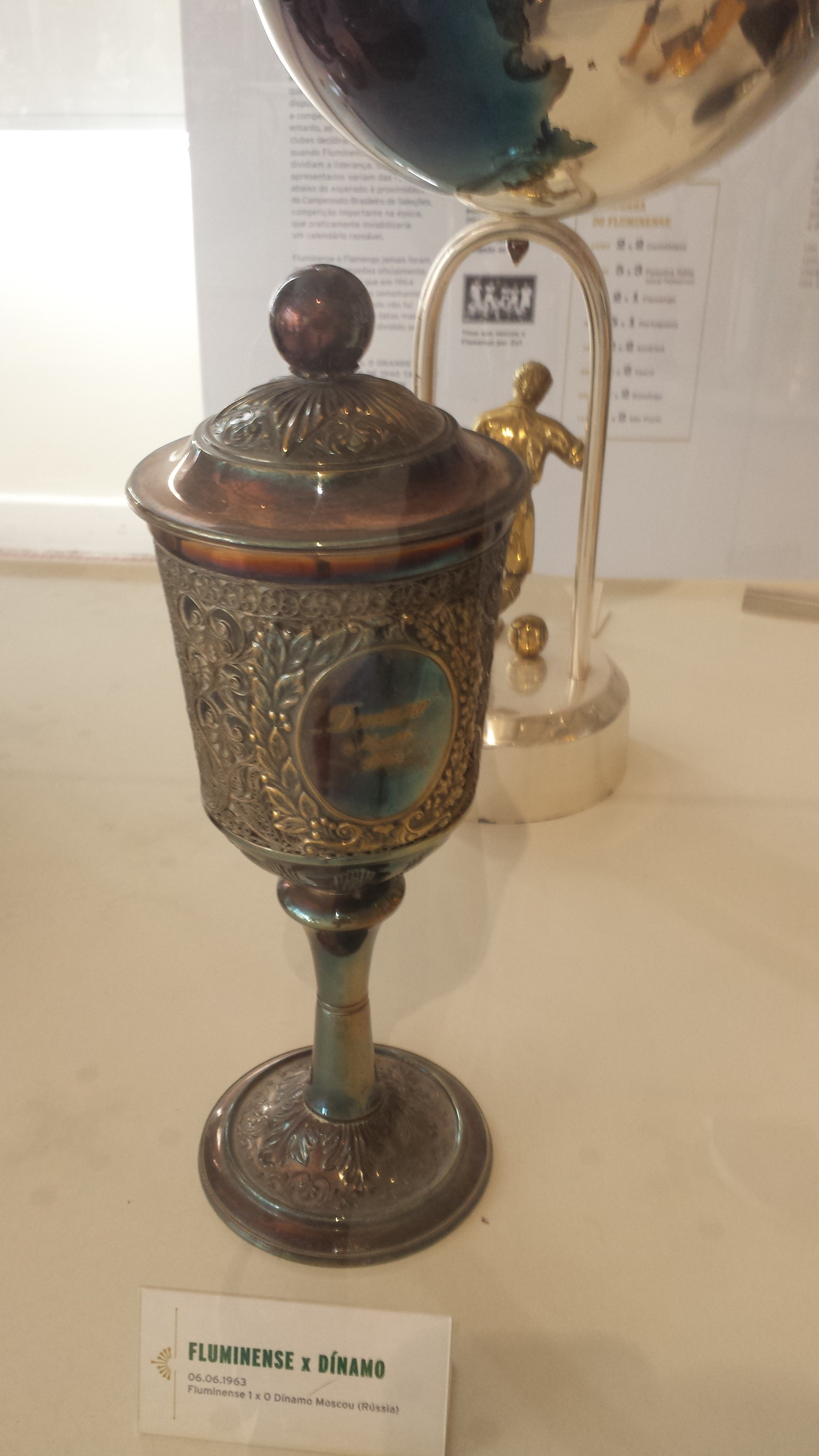 Taça Dínamo de Moscou versus Fluminense, disputada em 1963 na partida vencida pelo clube brasileiro por 1 a 0 em 6 de junho na capital da Rússia.